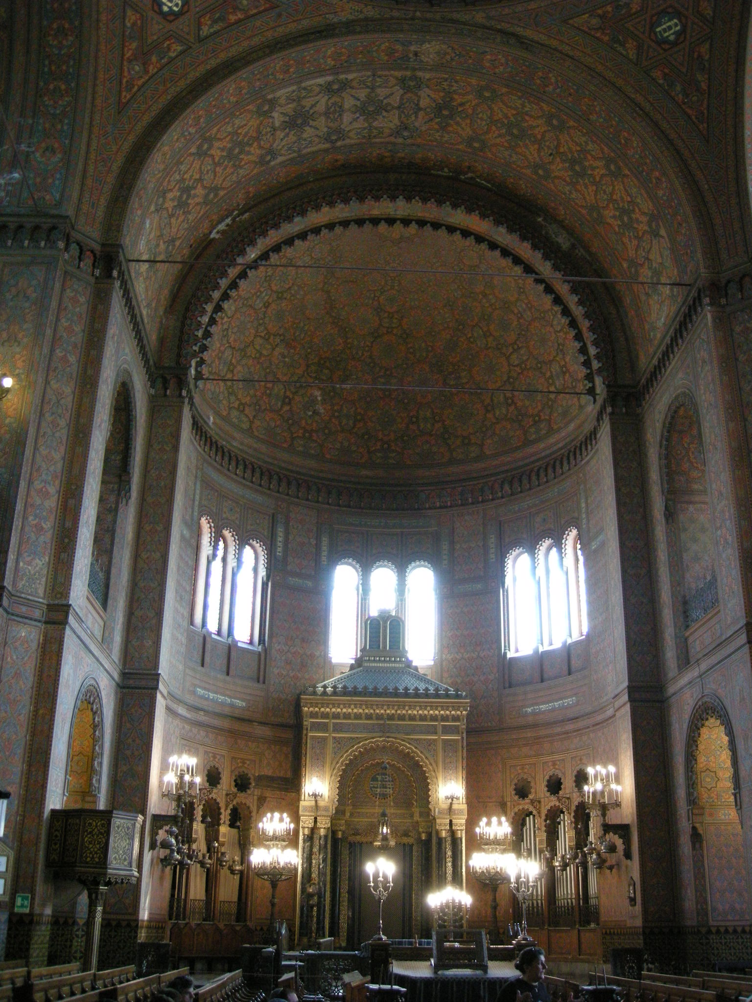 Sinagoga di firenze, interno